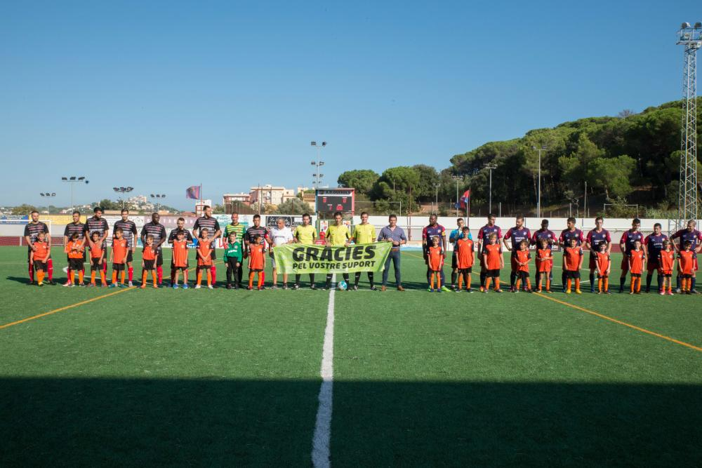 Partit històric entre clubs ganxons.